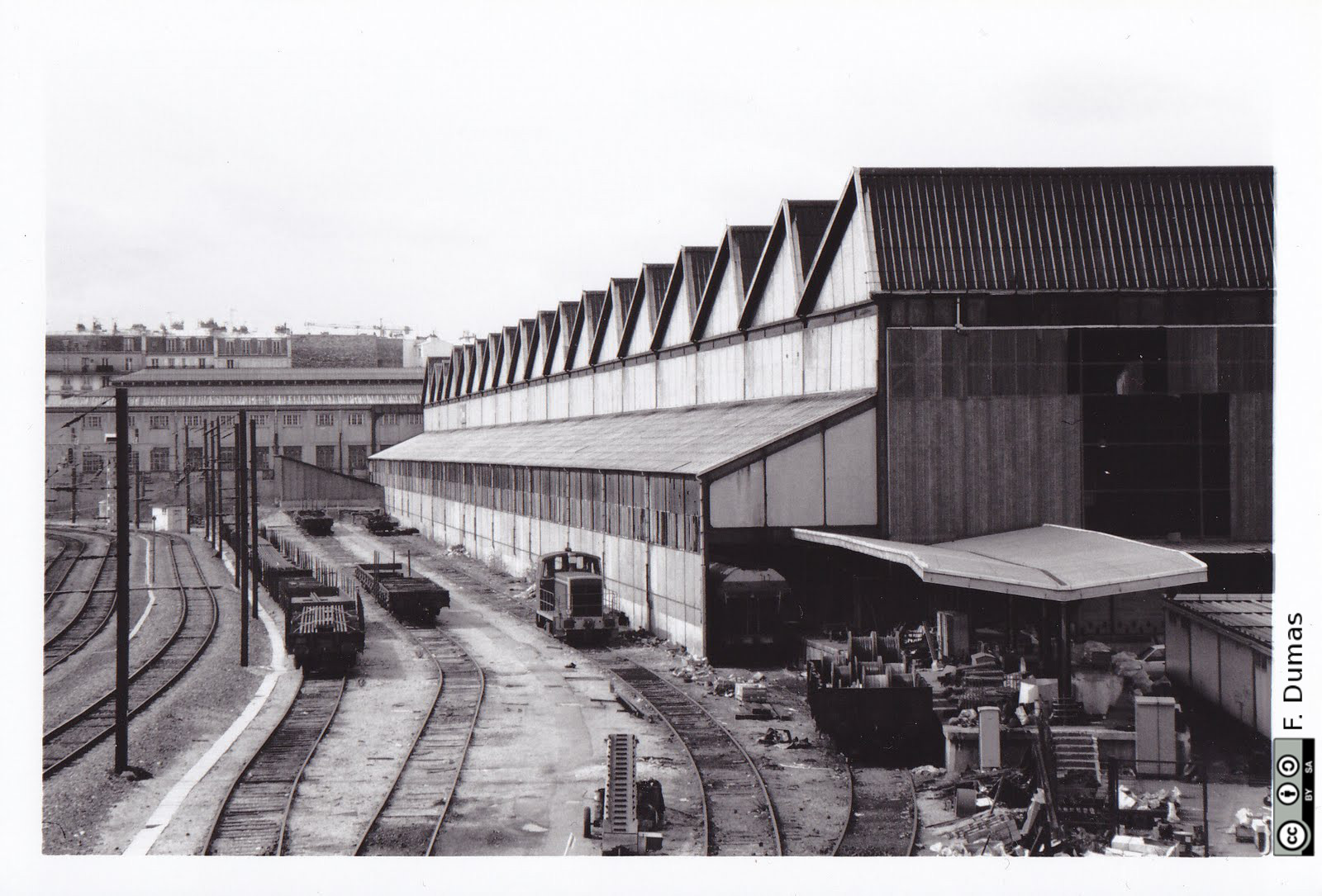 Vue sur la halle Pajol depuis les rails avant les travaux de rénovation de 2011-2012.